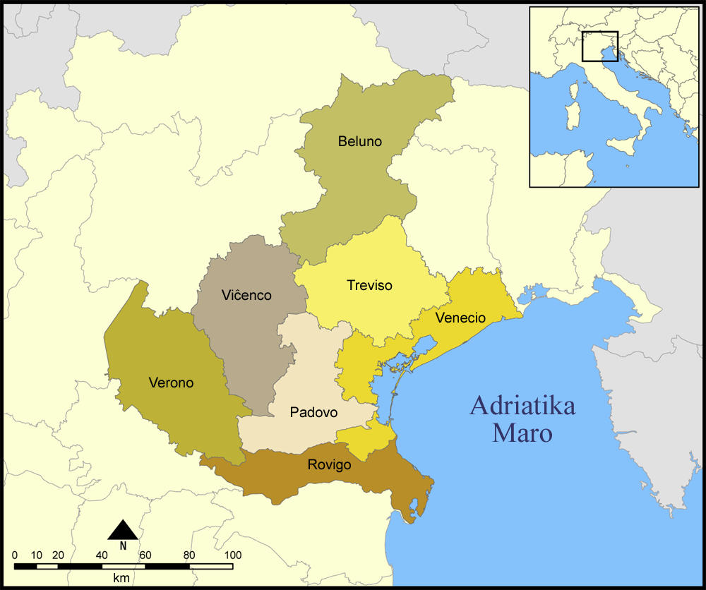 Provincoj de la itala regiono Veneto Fonto: adapto de la mapo Veneto el la vikipedia komunejo Aliaj versioj: Veneto lingve neŭtrala, italaj provinconomoj kaj Provinces of Veneto map kun anglalingva teksto Kategorio:Veneto